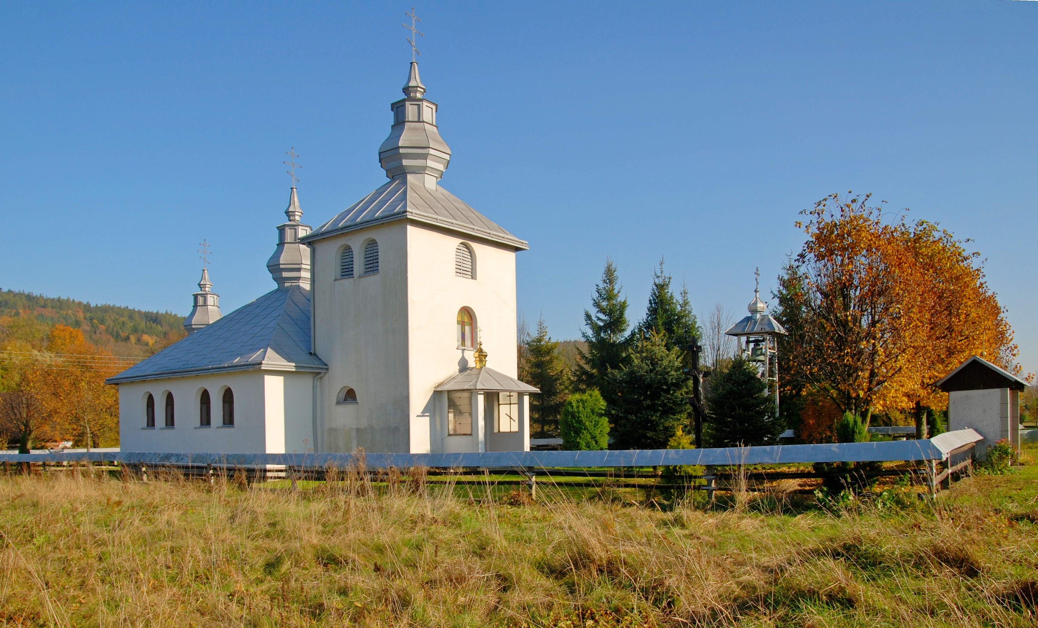 wieś Zyndranowa